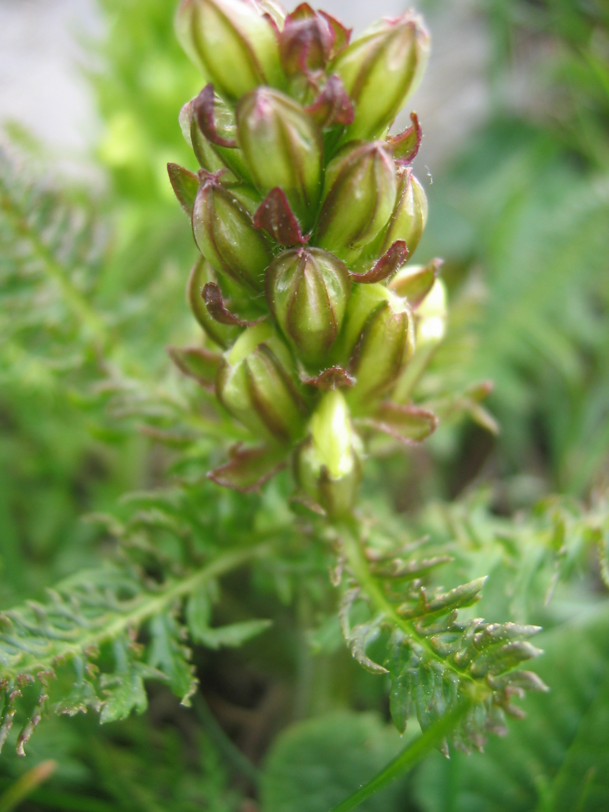 Pedicularis comosa : Bonnet de Calvin au dessus de Mens - (Trièves, France)